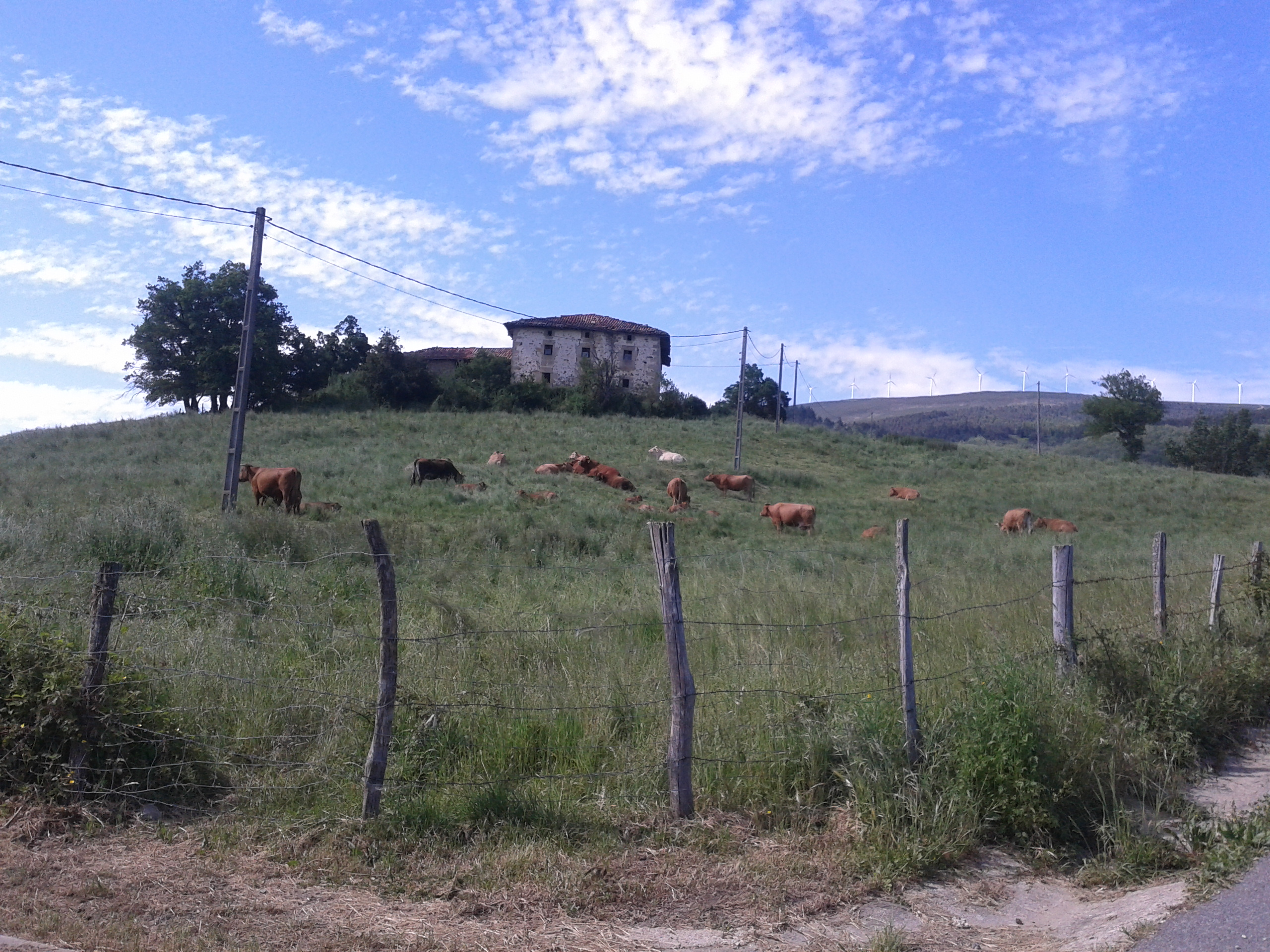 Elgeako Elizaldeko baserria